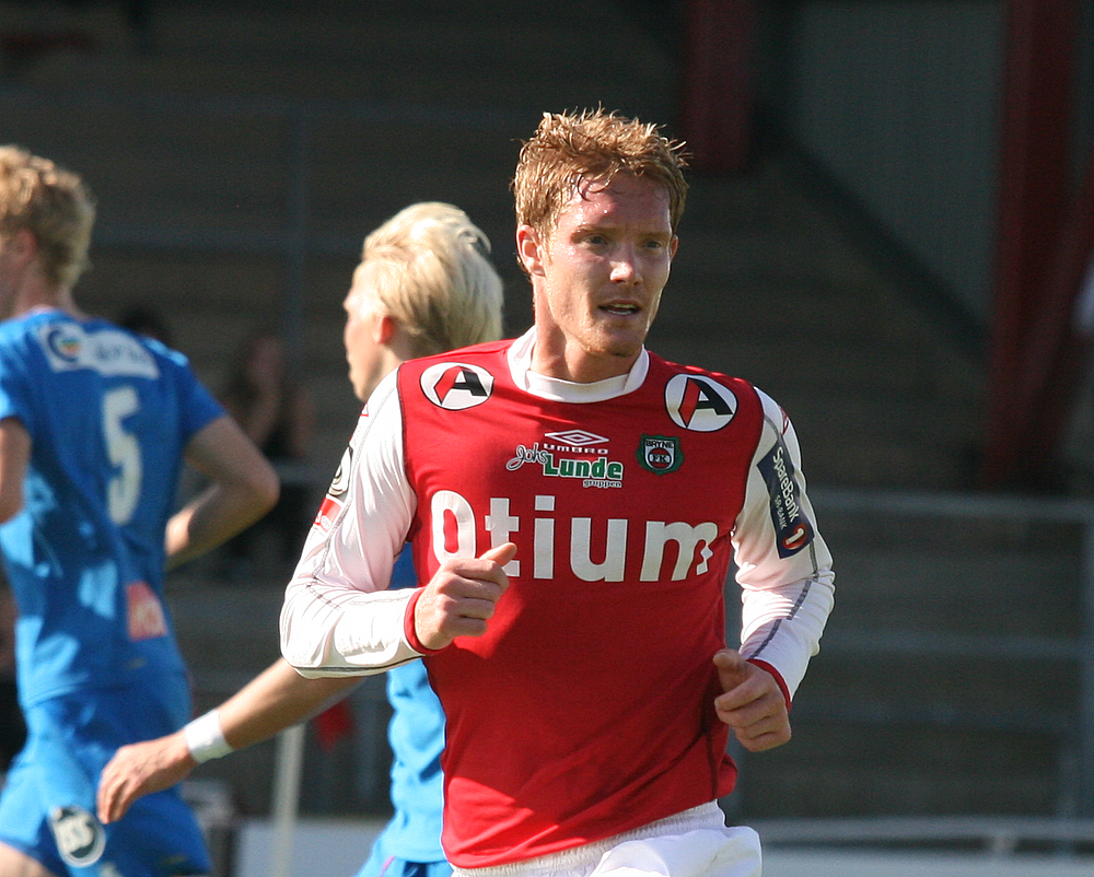 Tommy Eide Møster